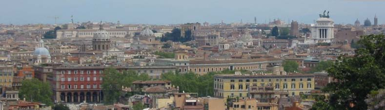 Panoramica del centro di Roma Foto fatta da it::en:User:Donarreiskoffer